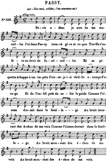 Chanson de Pierre Jean de Béranger sur un air de Joseph-Denis Doche attribué ici à Emile Debraux.